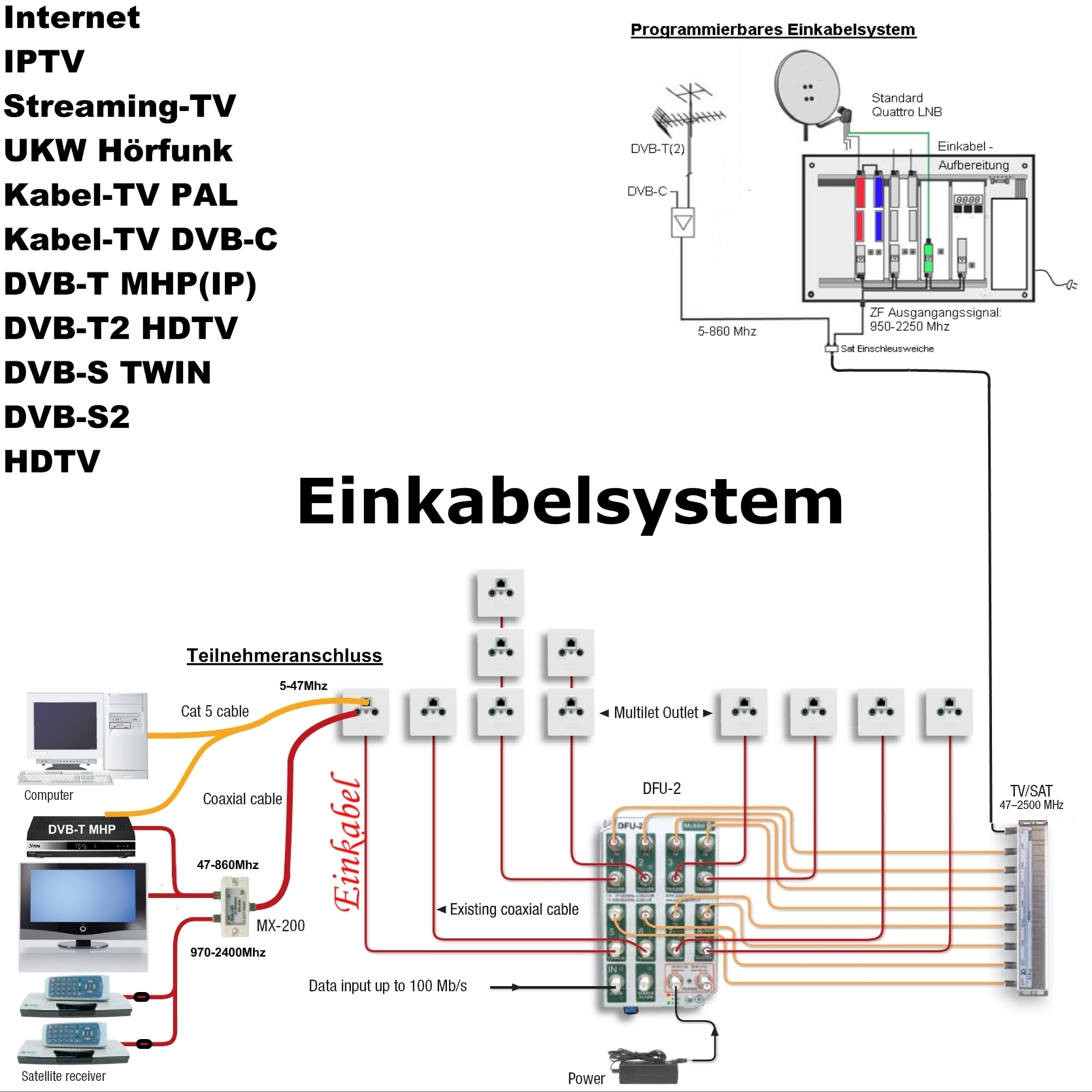 Einkabelsystem